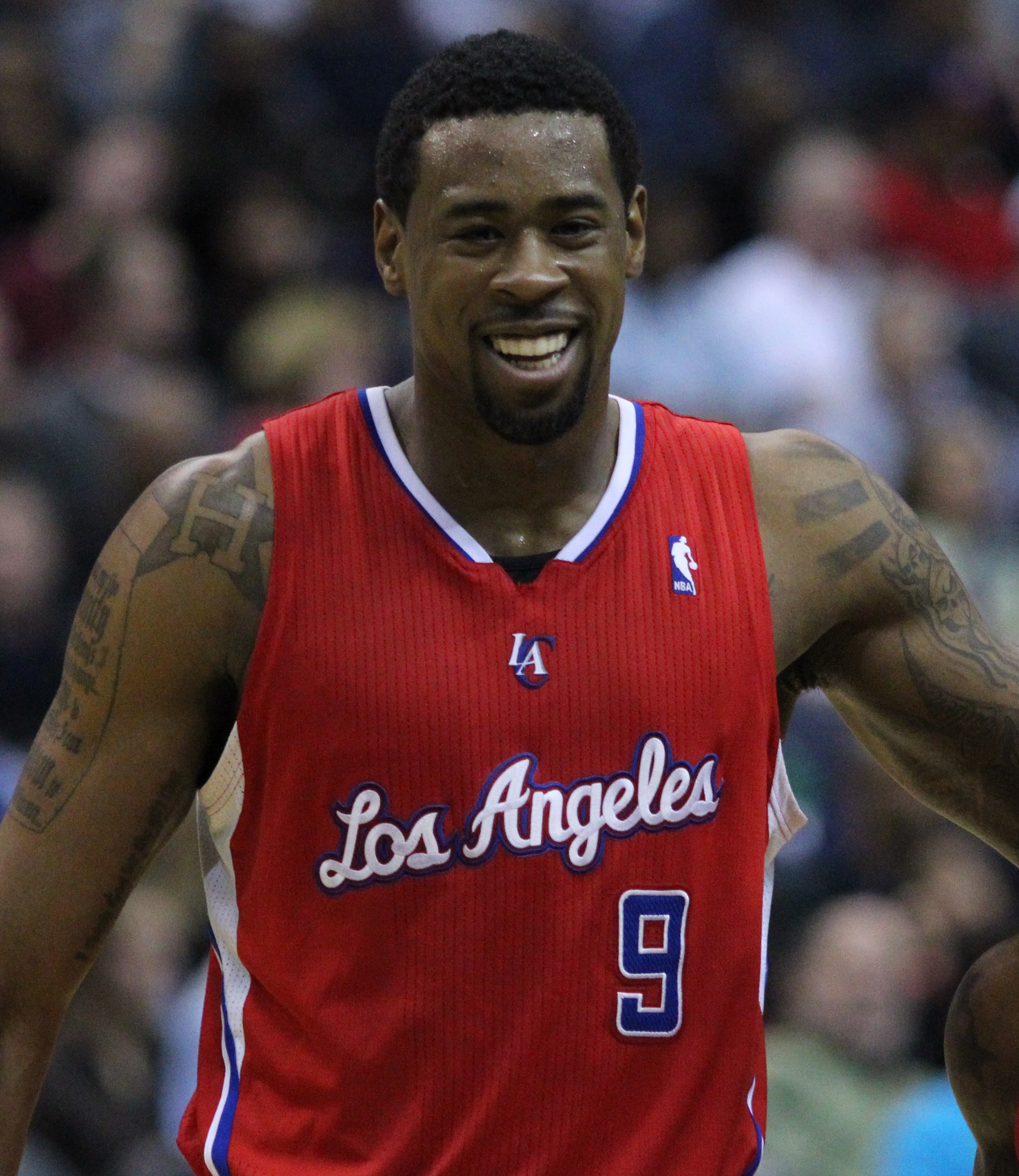 Wizards v/s Clippers 03/12/11